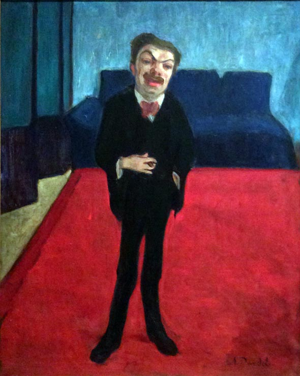 Konstnär Waldemar (Fille) Fromén, 1910 The artist Fille Fromén